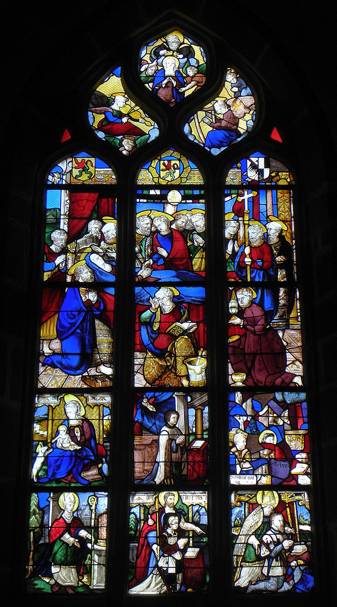 Baie 01 de l'église Saint-Lézin de La Chapelle-Janson (35).